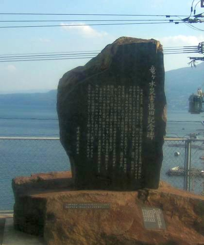 竜ヶ水駅の記念碑